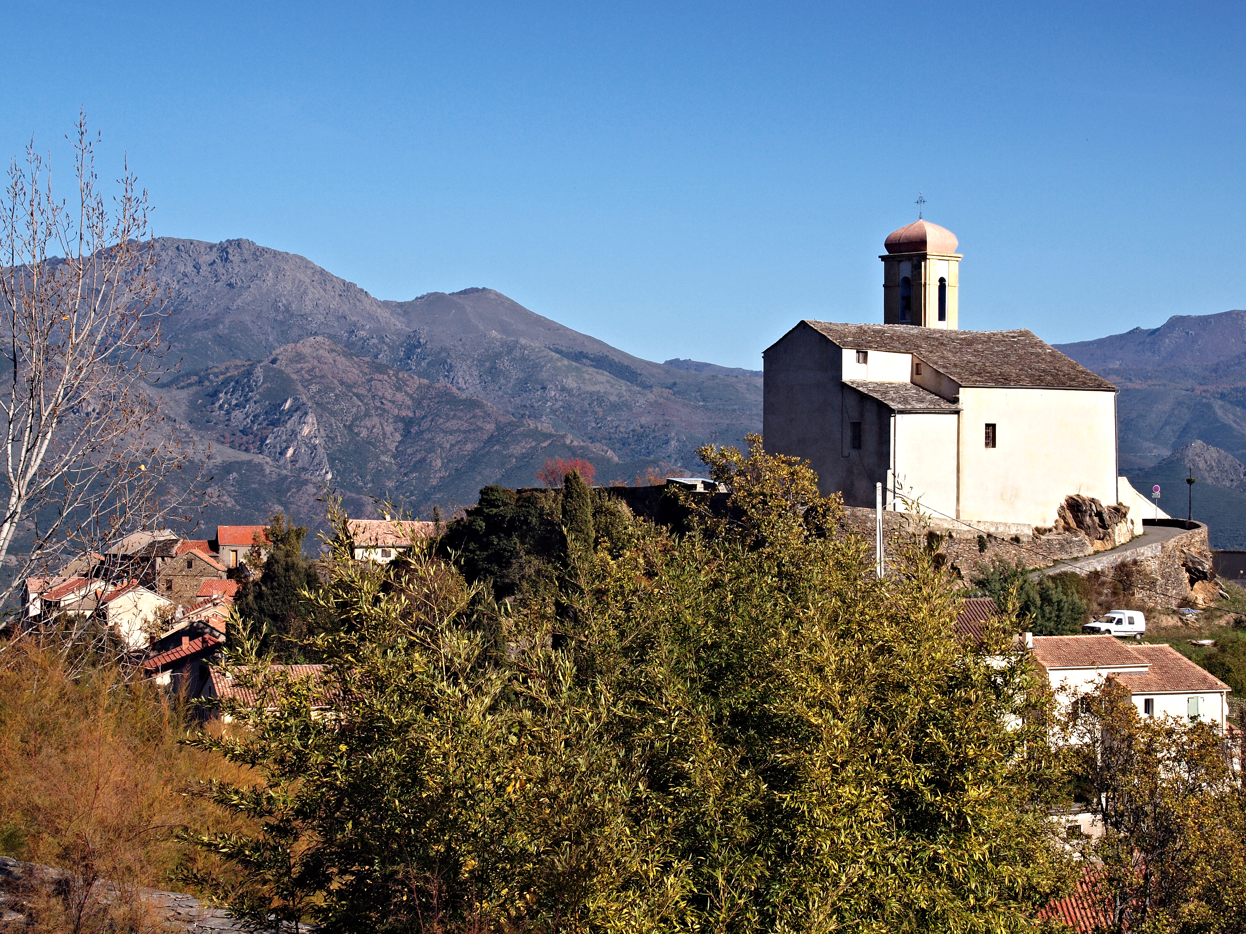 Poggio-di-Venaco - Village et église San Quilicu